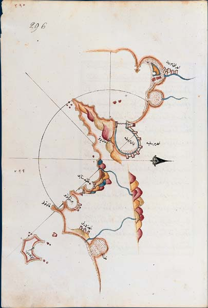 Le Livre de la mer Figuration des fonds marins Pîrî Reîs, Kitab-i bahriyye. Turquie, deuxième moitié du XVIe siècle. Manuscrit, encre sur papier, cartes en couleurs (35 x 23 cm) BNF, Manuscrits orientaux, supplément turc 956, f. 296